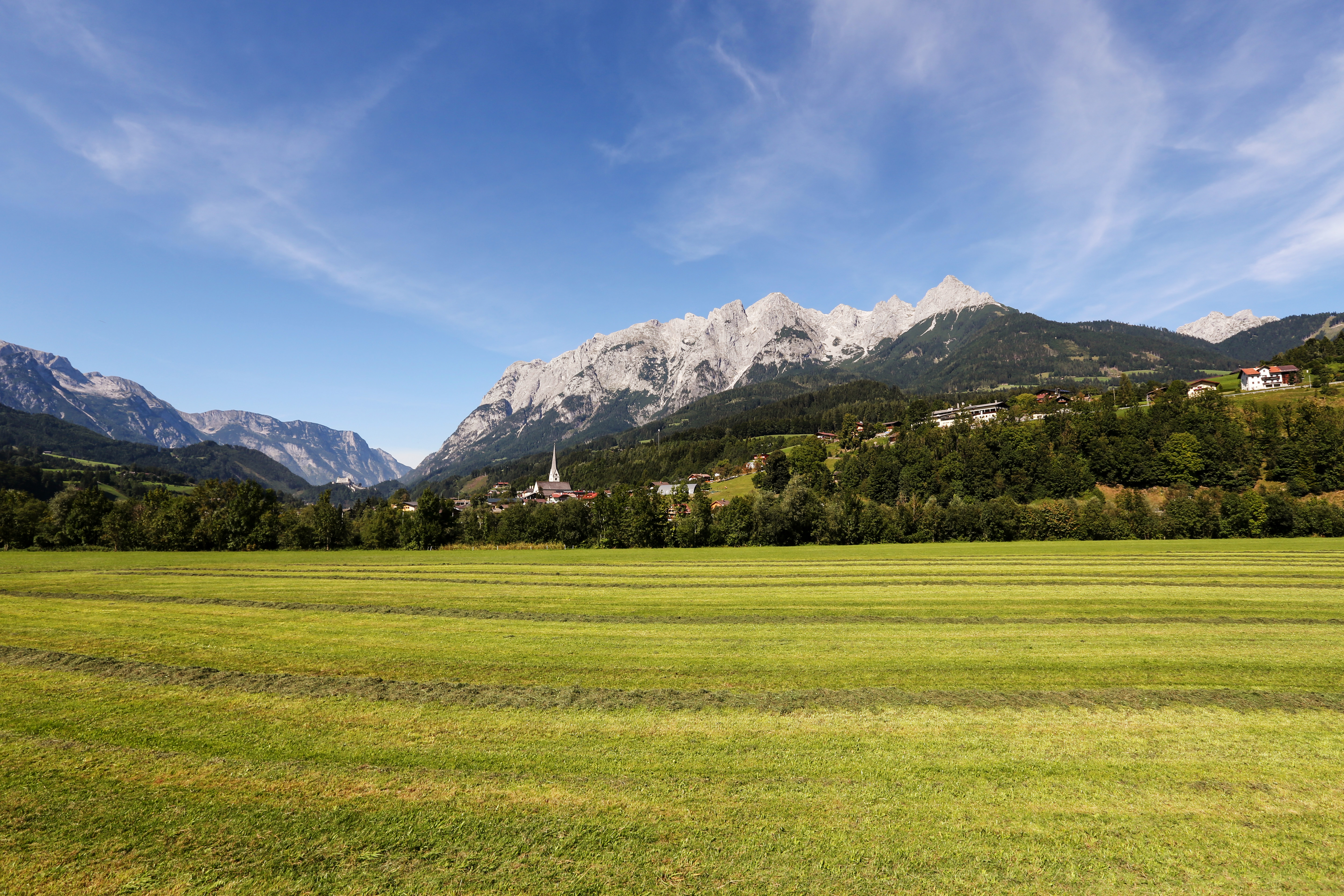 Pfarrwerfen mit dem Tennengebirge